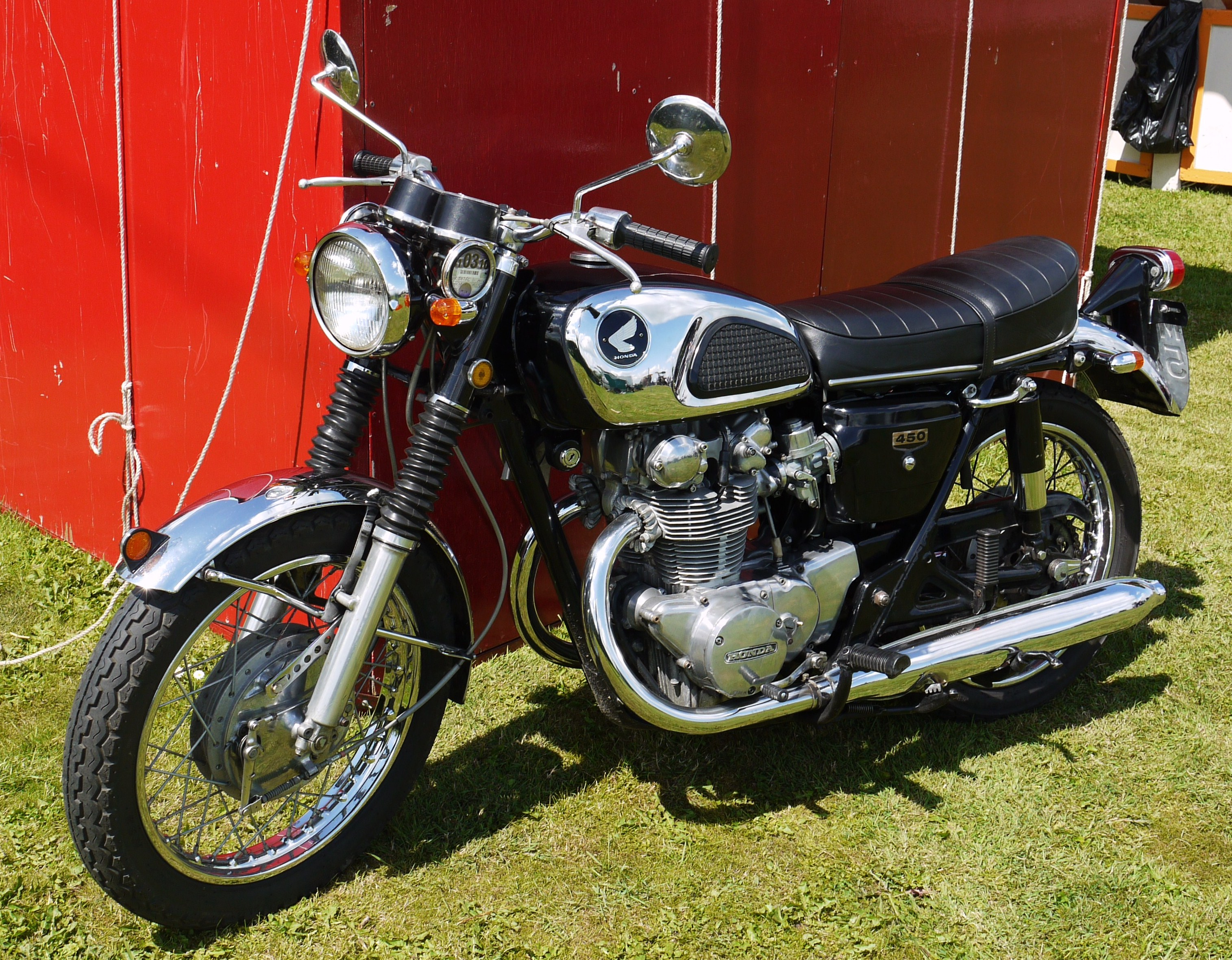 Panasonic G1 14-45 Lens